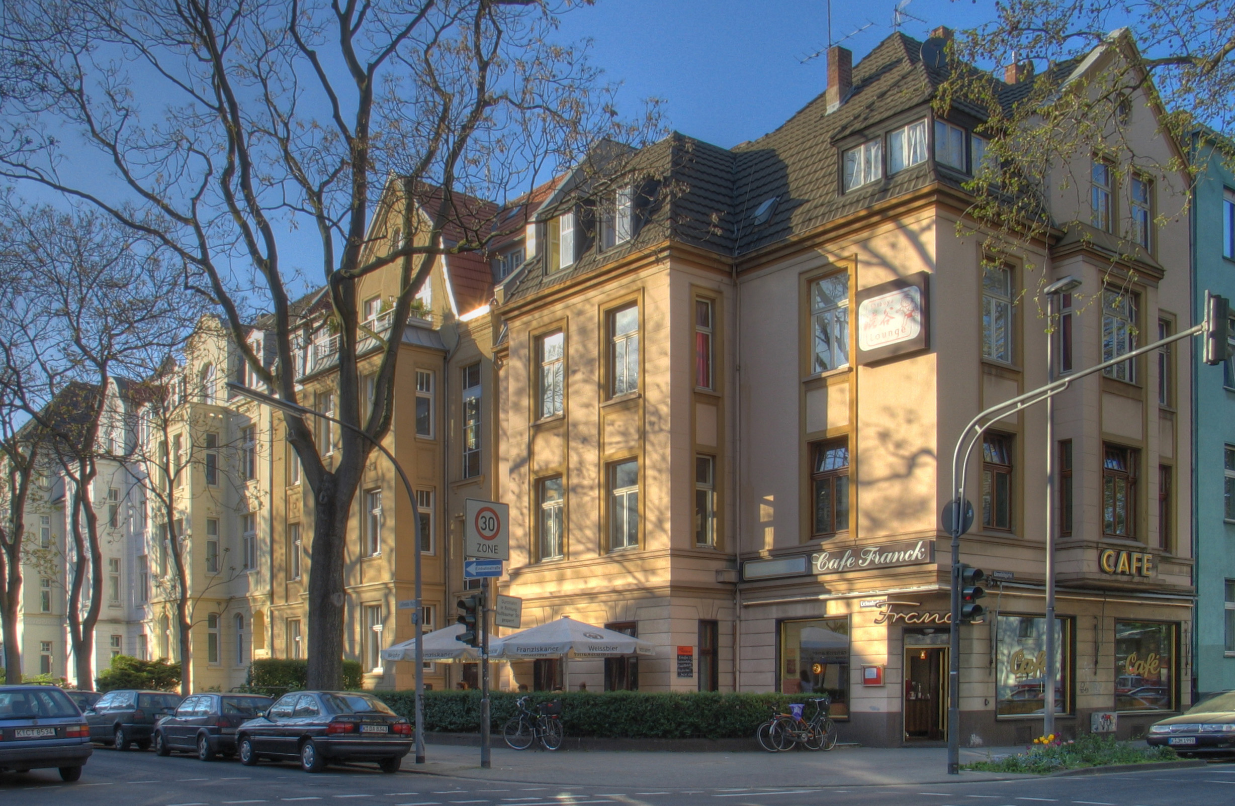 Eichendorfstraße 30 in Köln-Neuehrefeld This is a photograph of an architectural monument.